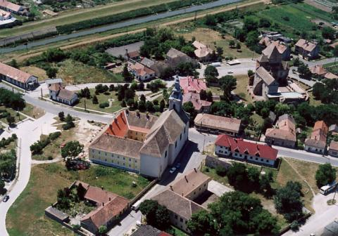 Simontornya, Hungary, aerialphotography